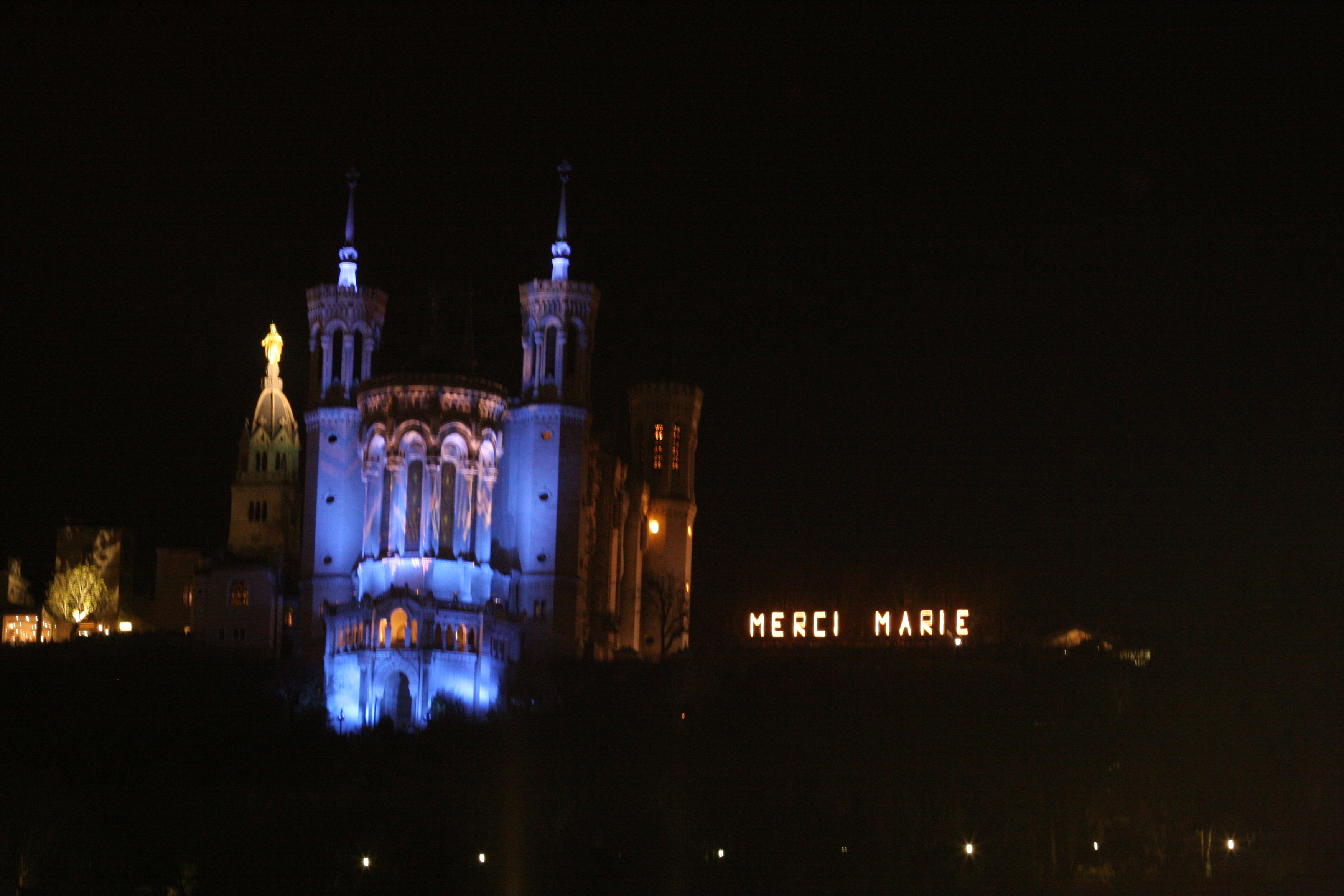 fêtes des lumières 2011